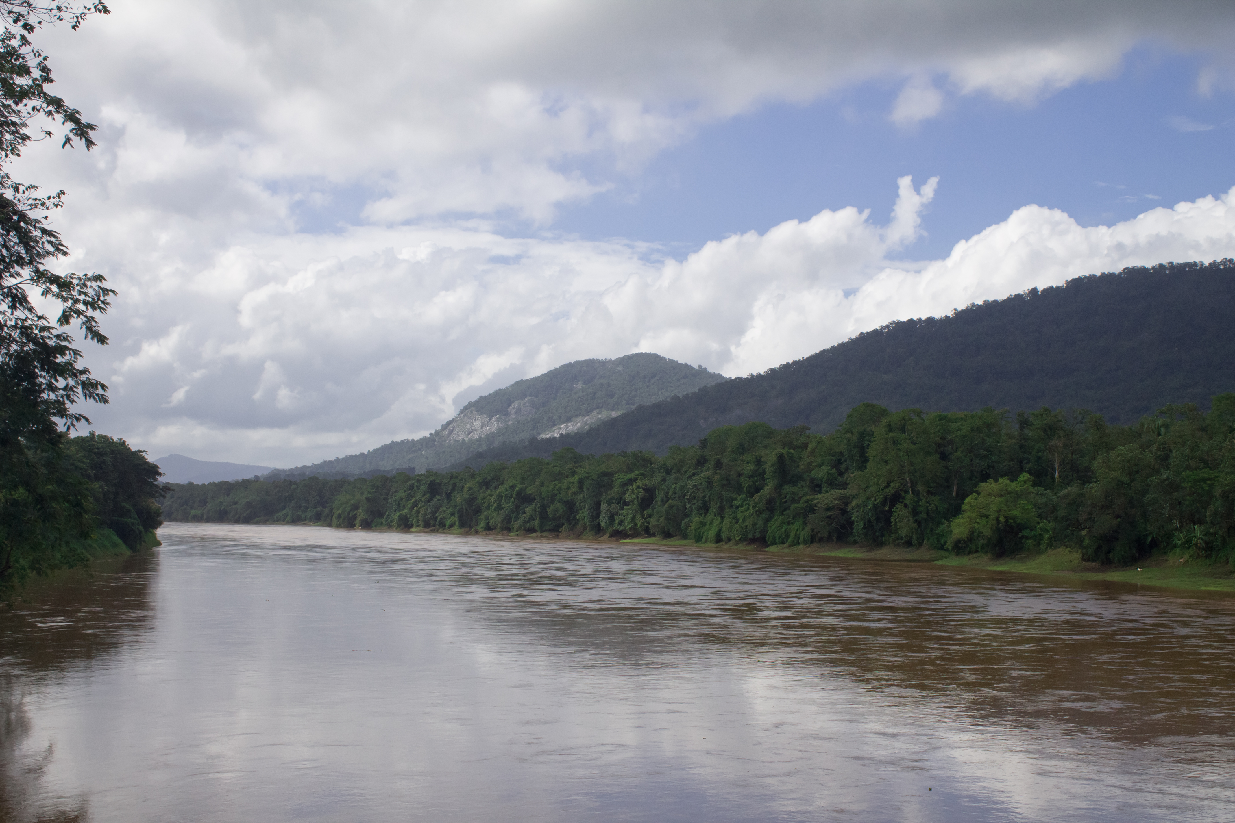 തൂക്കുപാലത്തിൽ നിന്ന് ഇഞ്ചത്തൊട്ടിയുടെ കാഴ്ച്ച